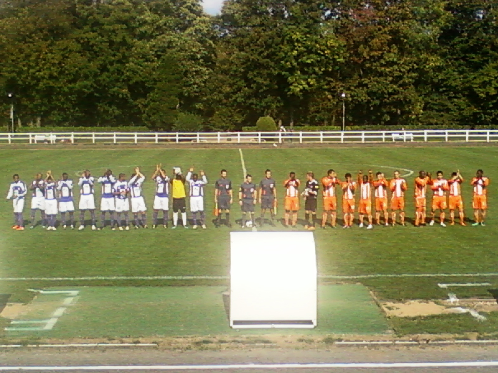 Présentation des équipes lors du match AC Boulogne-Billancourt - Les Lilas (1-1) du 25 septembre 2011 au stade Marcel Bec de Meudon